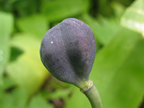 Плод кандыка сибирского. Хакасия, Кузнецкий Алатау, верхняя граница леса.